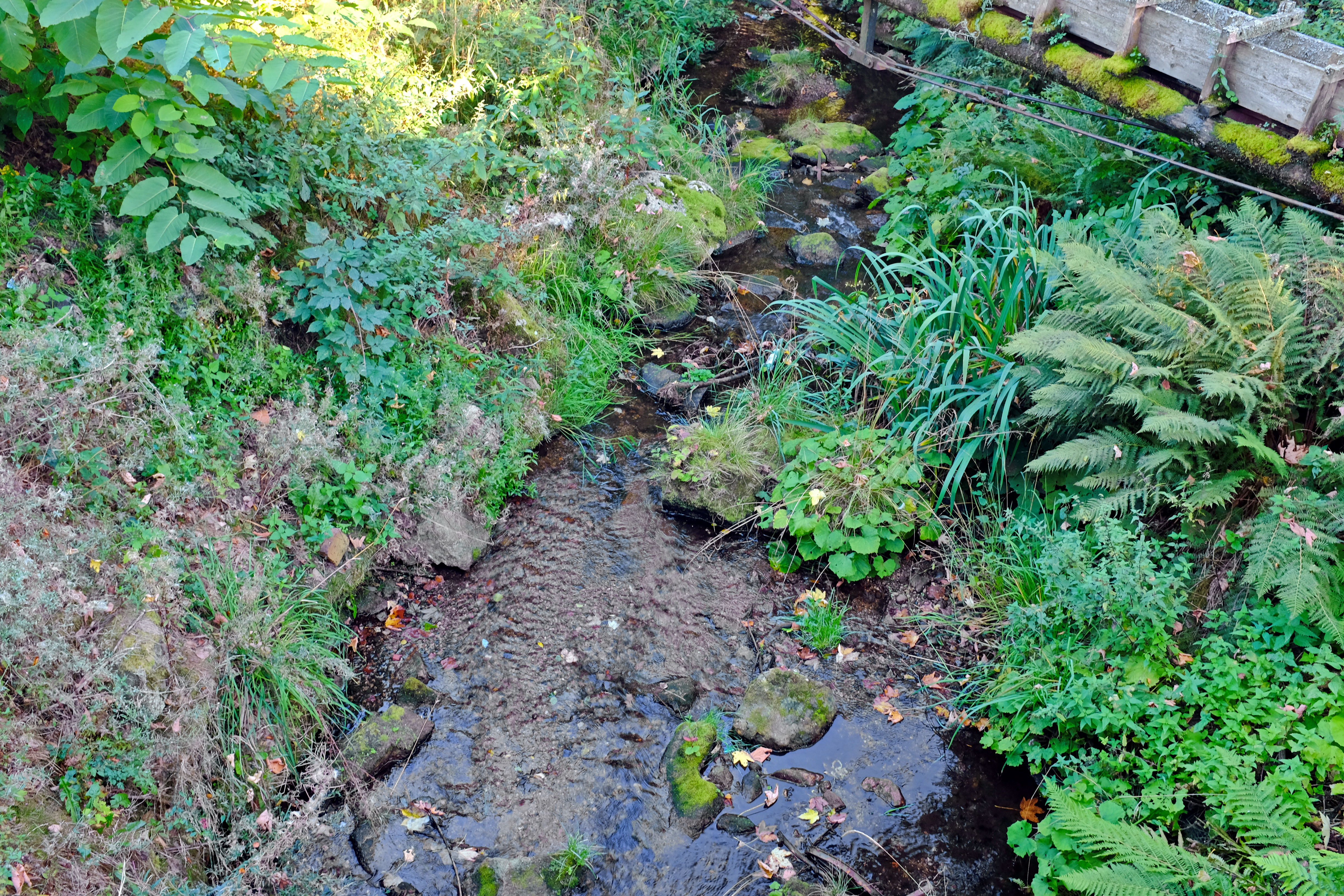 Rudný potok (Rudenský potok), ve Vysoké Peci, Krušné hory, okres Karlovy Vary